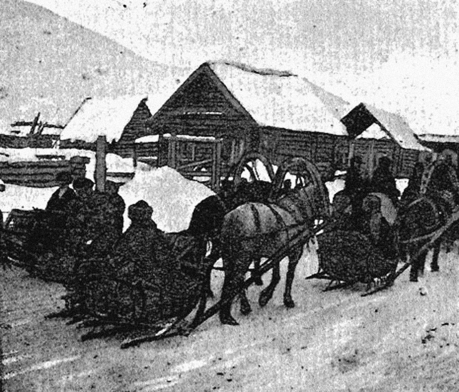 Бухтарминские старообрядцы. Катание на Масленицу. Источник: Бухтарминские старообрядцы. Материалы комиссии экспедиционных исследований. Серия Казахстанская. Вып. 17. Л., 1930.